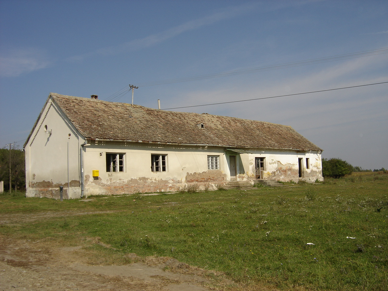 Majške Međe, stara škola